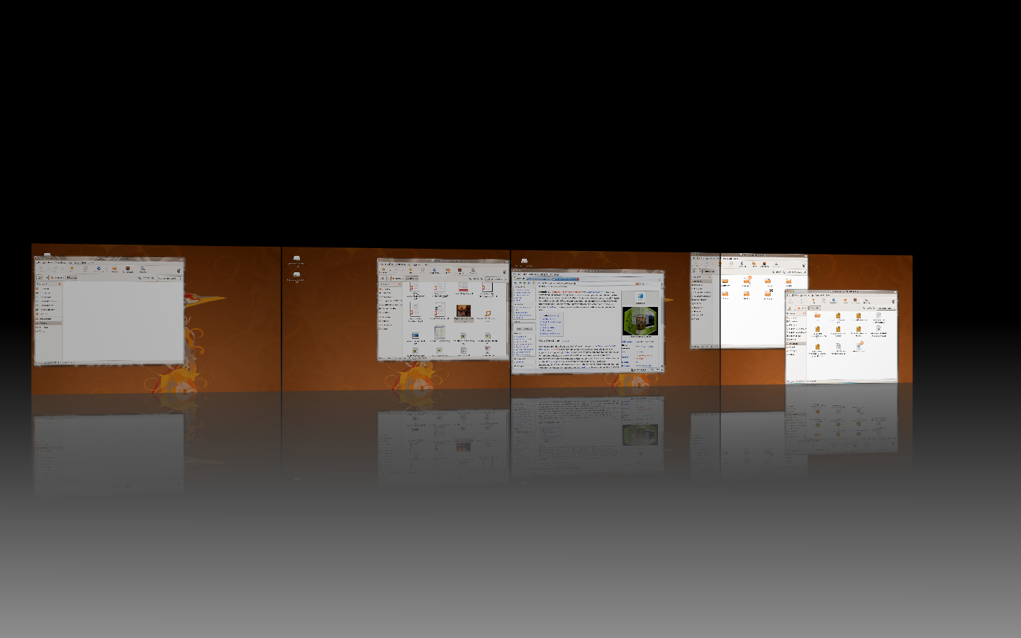 Compiz Fusion